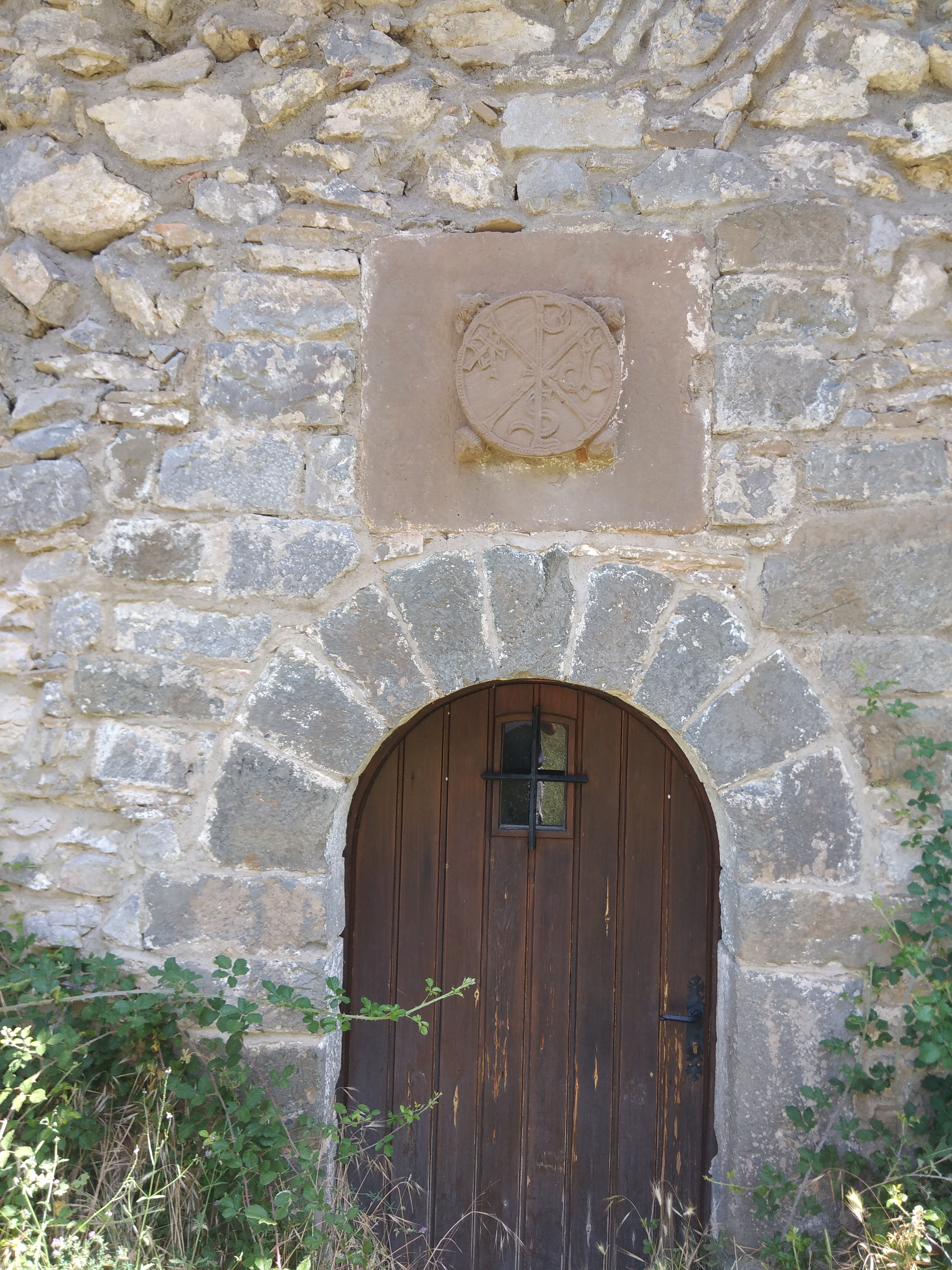 Crismón románico, siglo XII, de la ermita de san Pedro de Usún, Navarra, antiguo monasterio medival, siglo IX